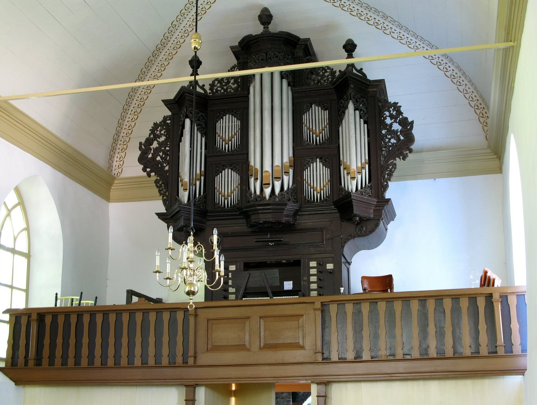 Orgel in Mensingeweer, Niederlande